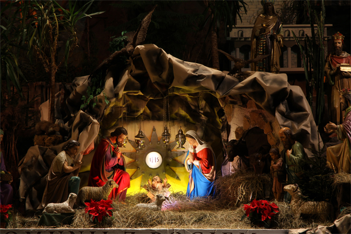 Crib in Katowice Panewniki, Poland (2010)